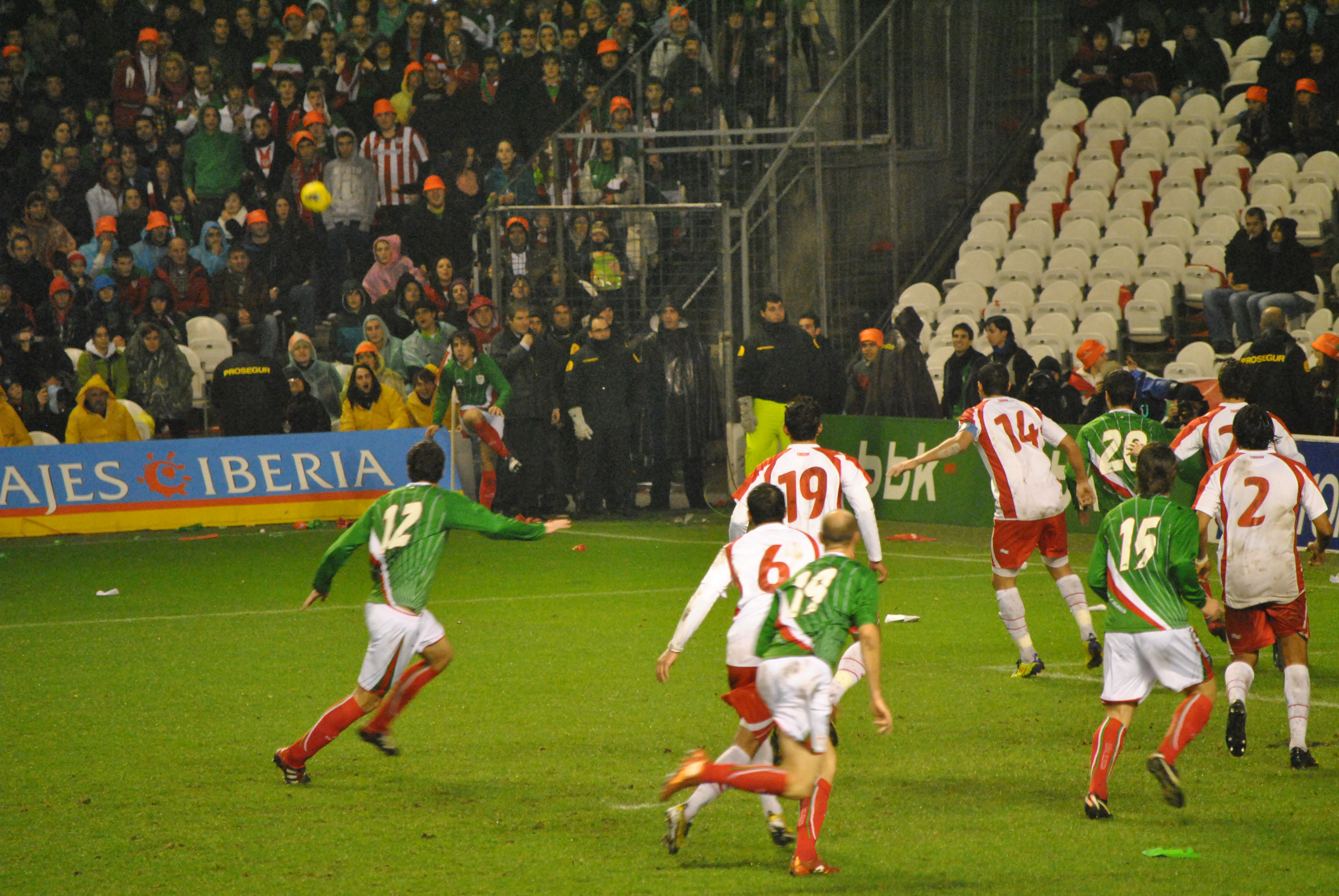 Multitud de ocasiones.- La tricolor hizo todo lo posible por hacer del partido un auténtico festival de goles. Para ello los jugadores se entregaron al máximo pese a ser un encuentro amistoso. De hecho, en la segunda parte se notó que La Euskal Selekzioa salía todavía con más hambre de gol. Sin embargo, se encontraron con un rival que defendió a conciencia en cada una de las jugadas y con un portero que estuvo bastante acertado.